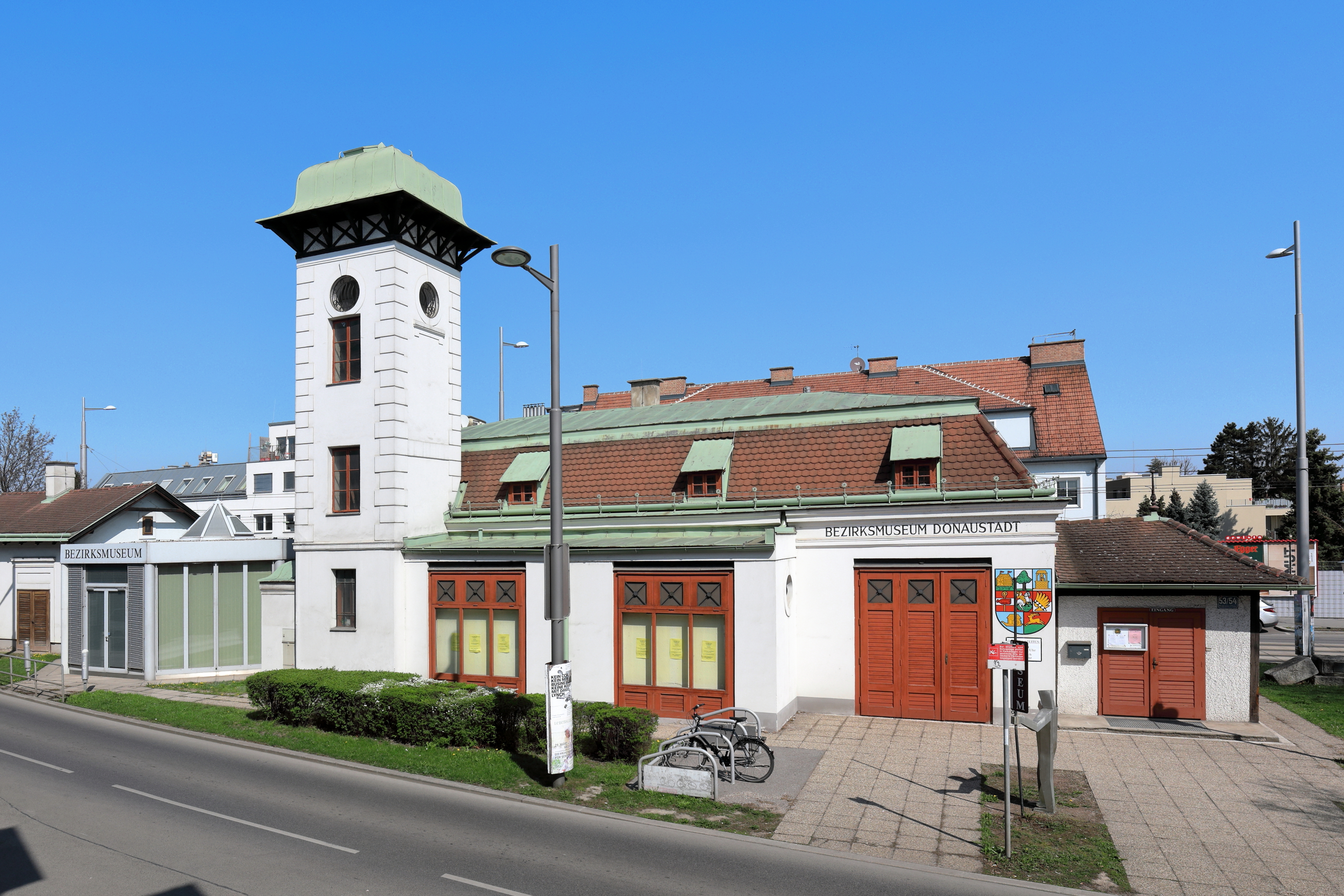 Südansicht des Donaustädter Bezirksmuseums im 22. Wiener Bezirk. Das Museum wurde im ehemaligen, 1905 errichteten Gebäude der Freiwilligen Feuerwehr Kagran eingerichtet und am 22. Oktober 1983 eröffnet. Später wurde auch die direkt westlich liegende ehemalige Dampfstraßenbahn-Station Kagran aus dem Jahr 1876 als Museumsgebäude miteingebunden. In weiterer Folge wurde zwischen den beiden Gebäuden ein Glas-Oktaeder als Verbindung errichtet und am 30. März 2003 seiner Bestimmung übergeben.